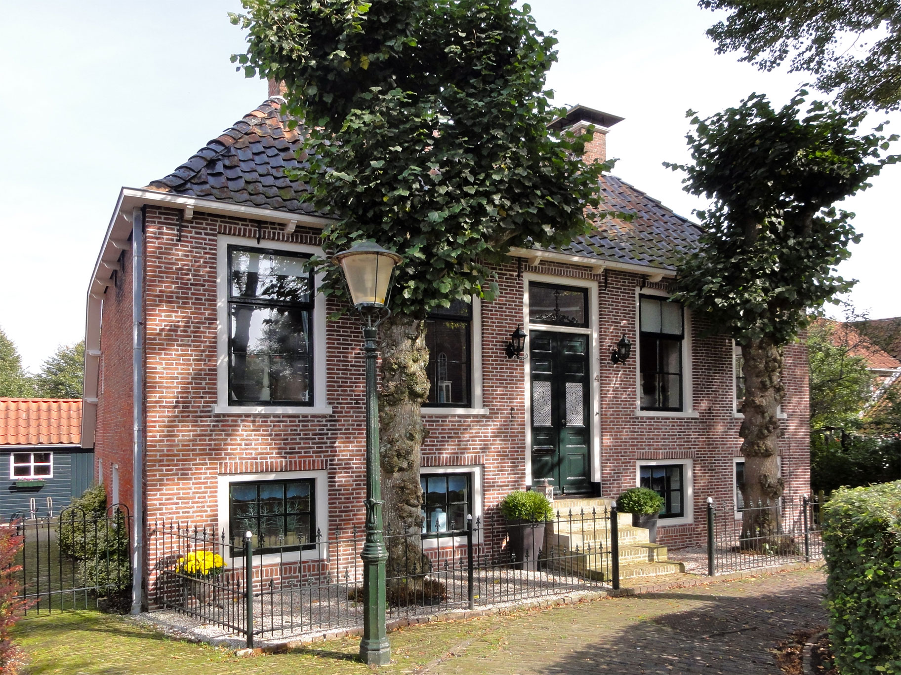 Omgong 4 in Ee